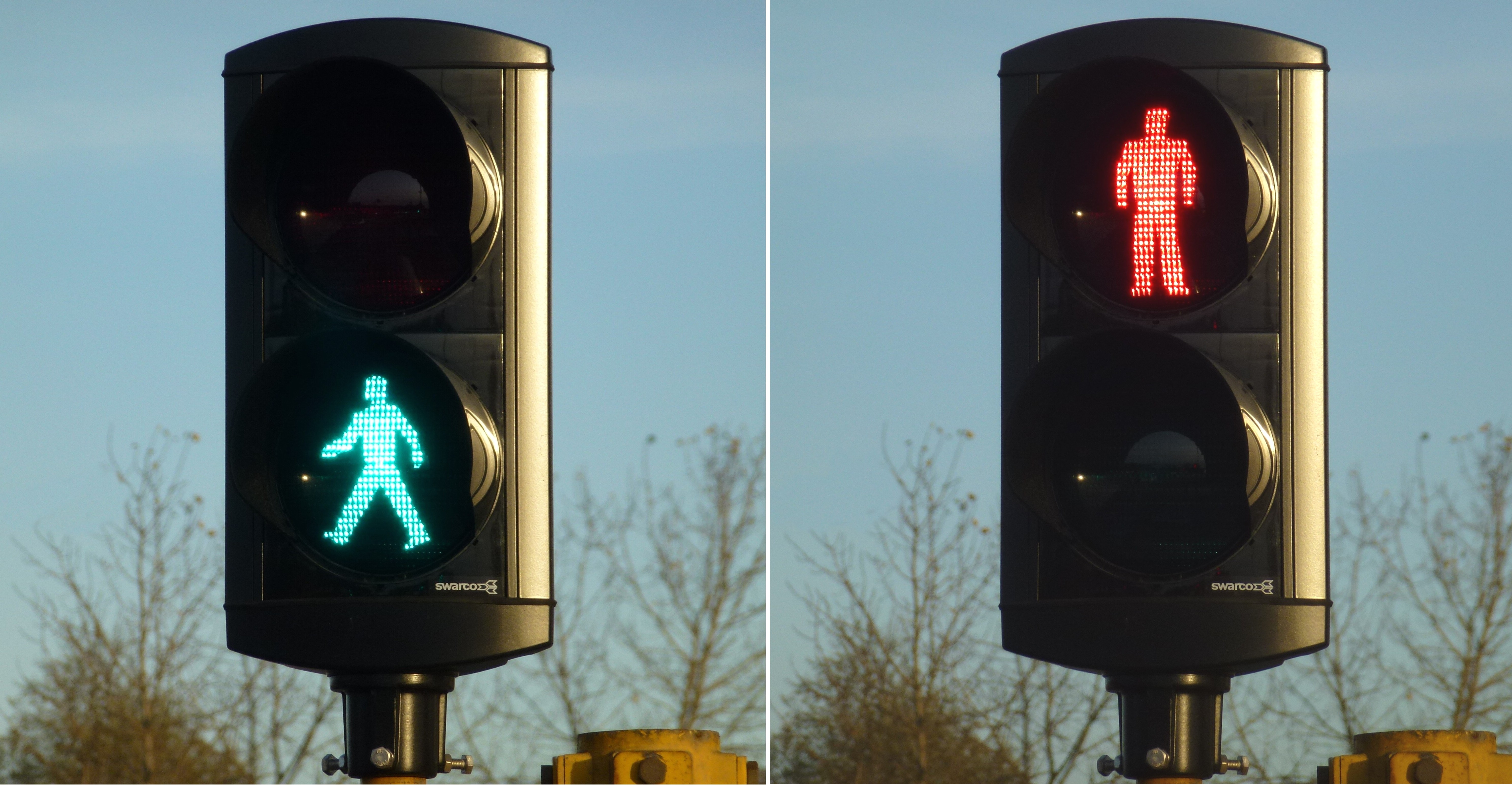 Trafiksignal gående grönt rött